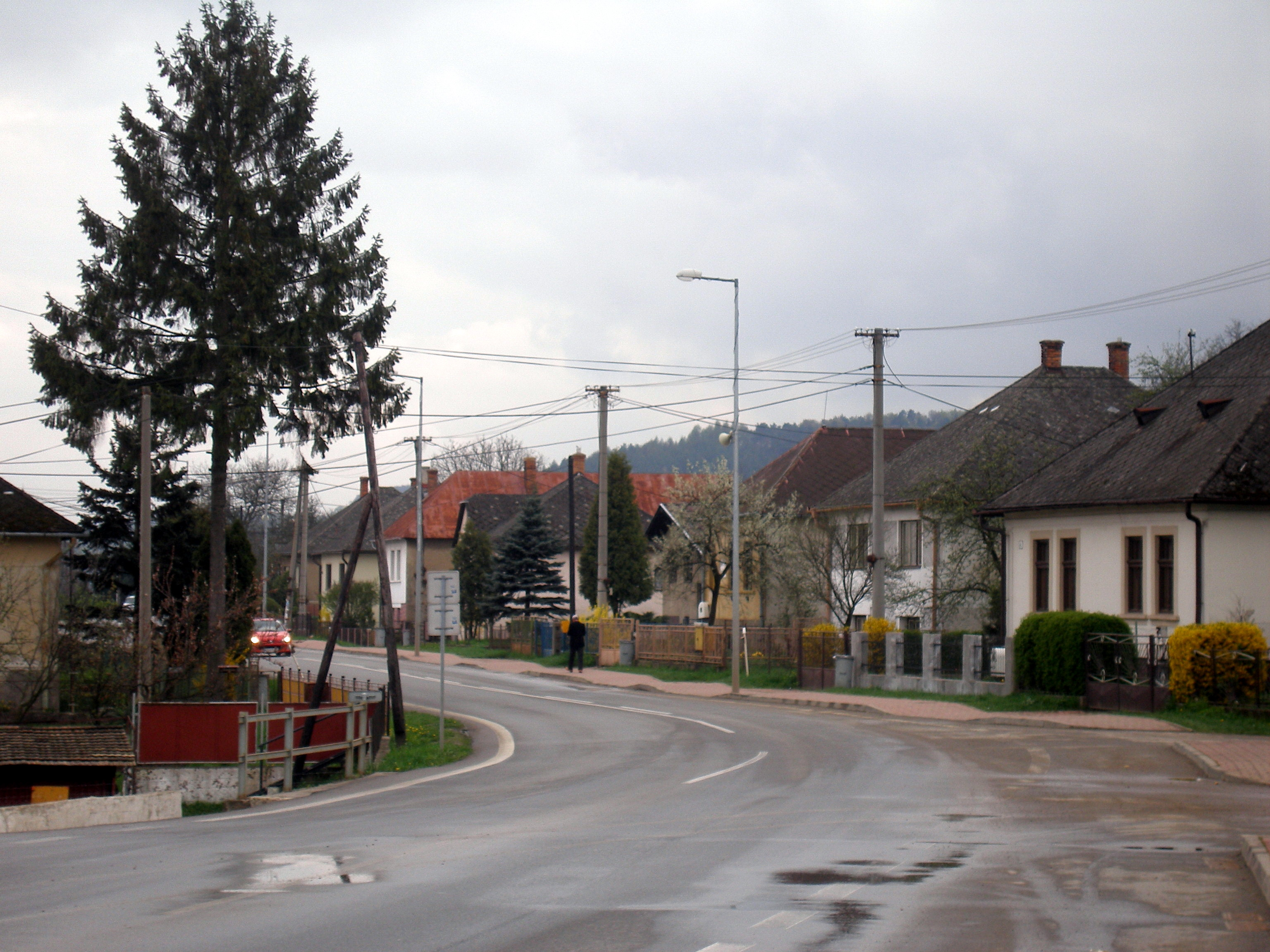 Obec Kendice okres Prešov, región Šariš